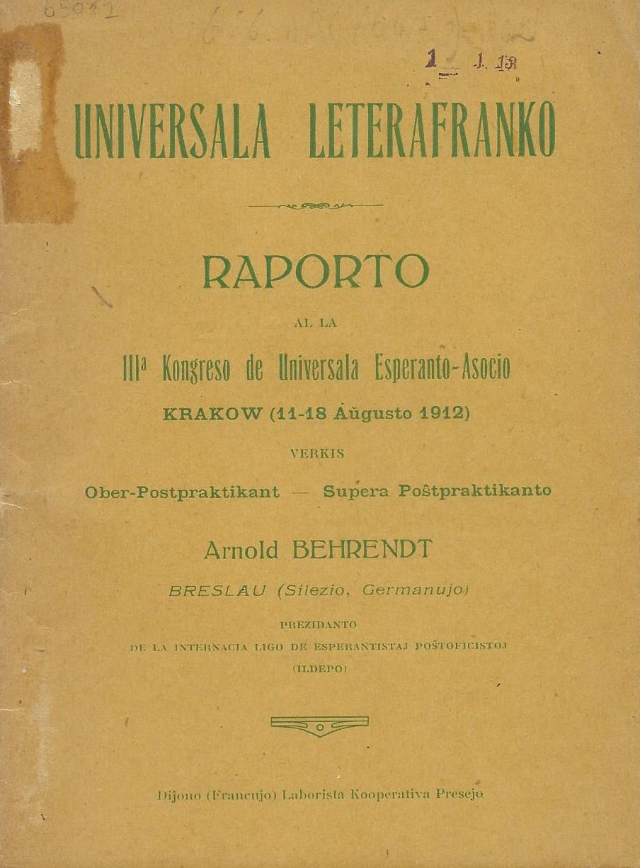 Universala Leterafranko, 1912